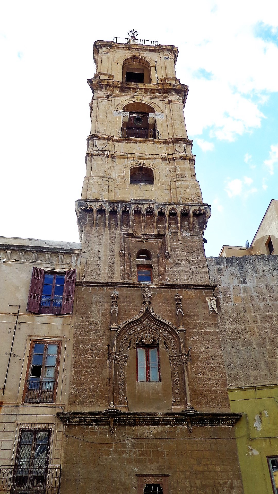 Interno chiesa